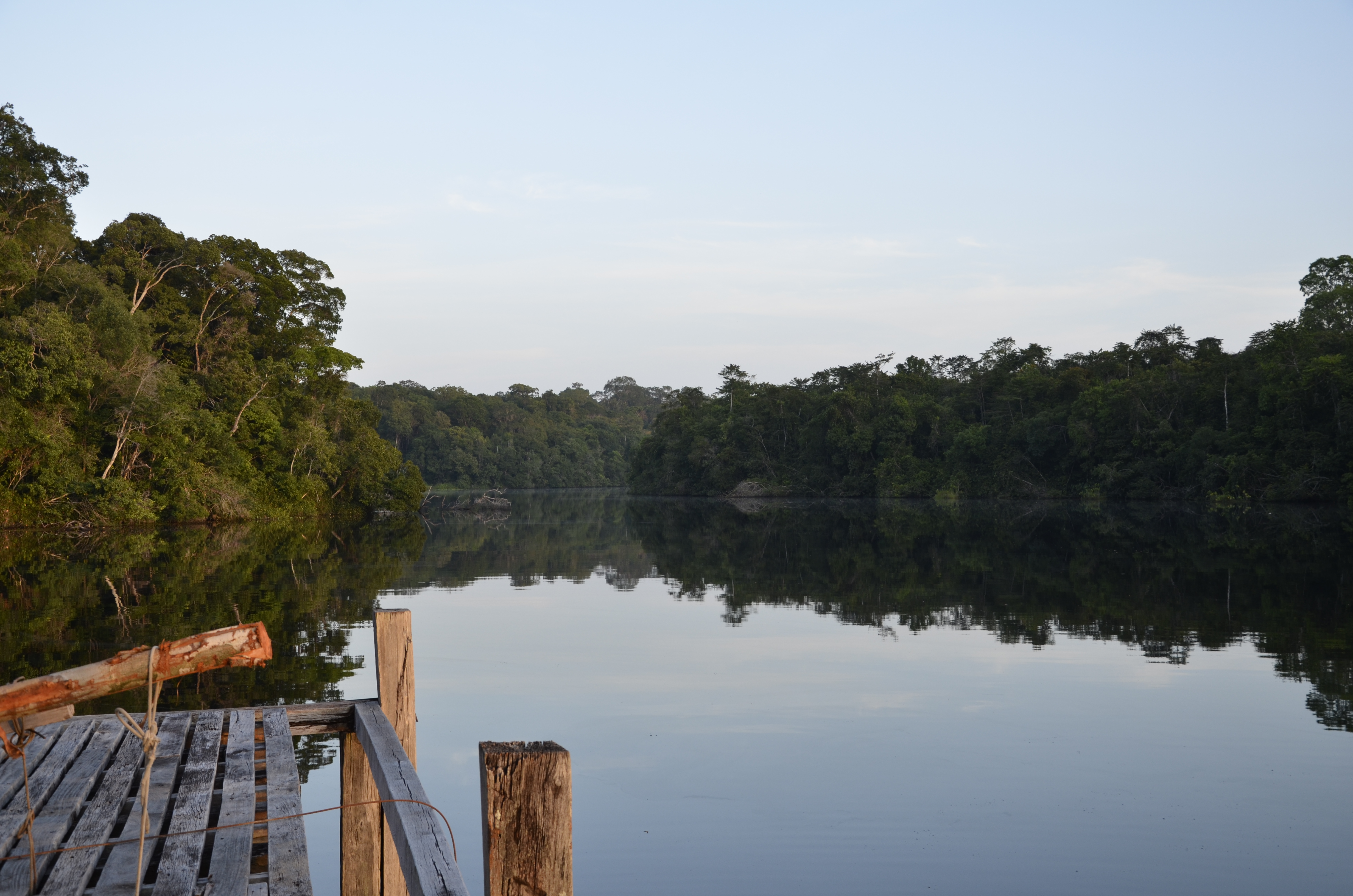 Amanhecer no rio Caxiuanã em frente a Estação Científica Ferreira Pena.